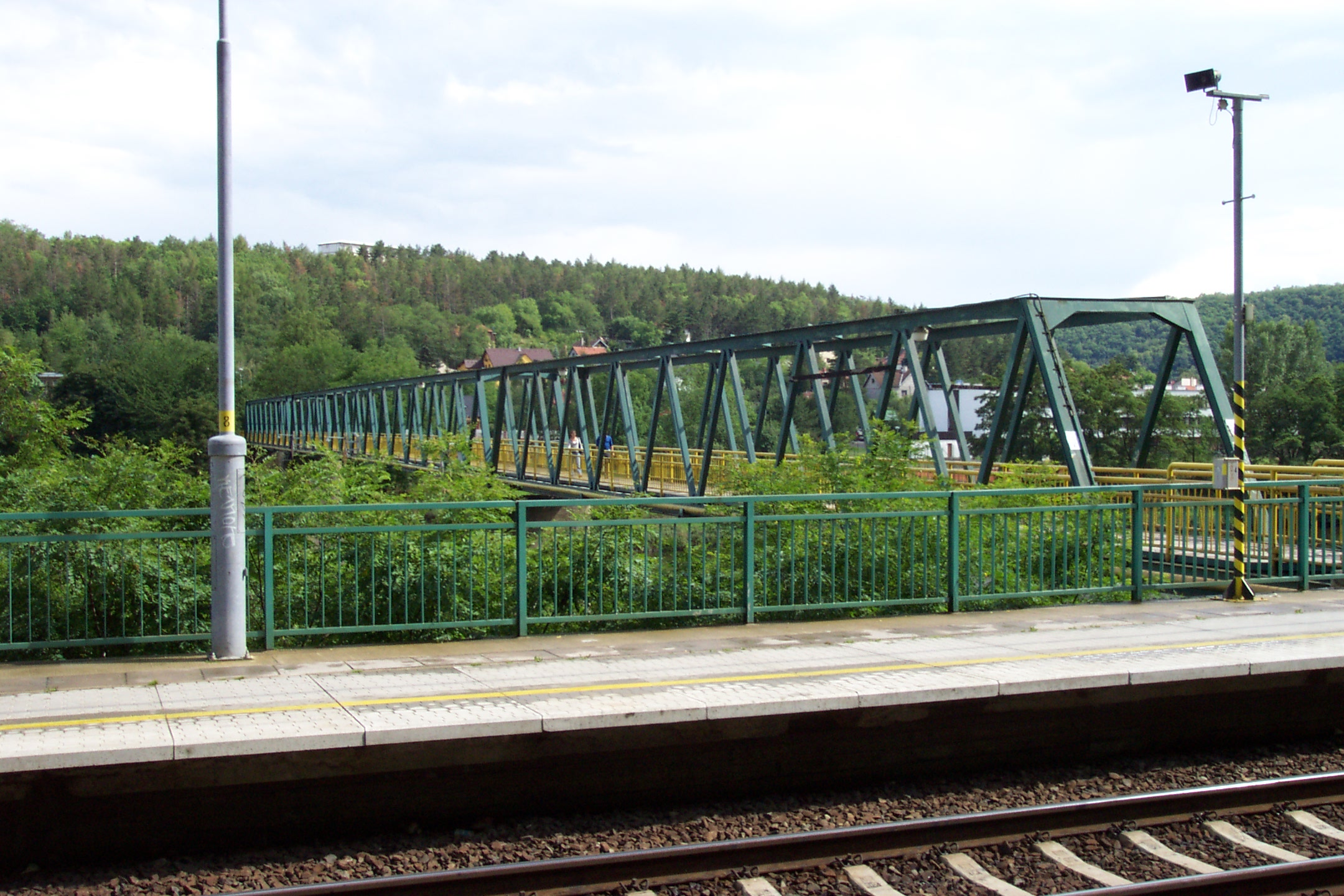 Lávka v Řeži u Prahy - Bridge in Řež near Prague